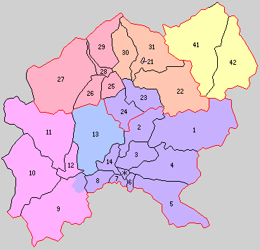 岩手県岩手郡の町村。